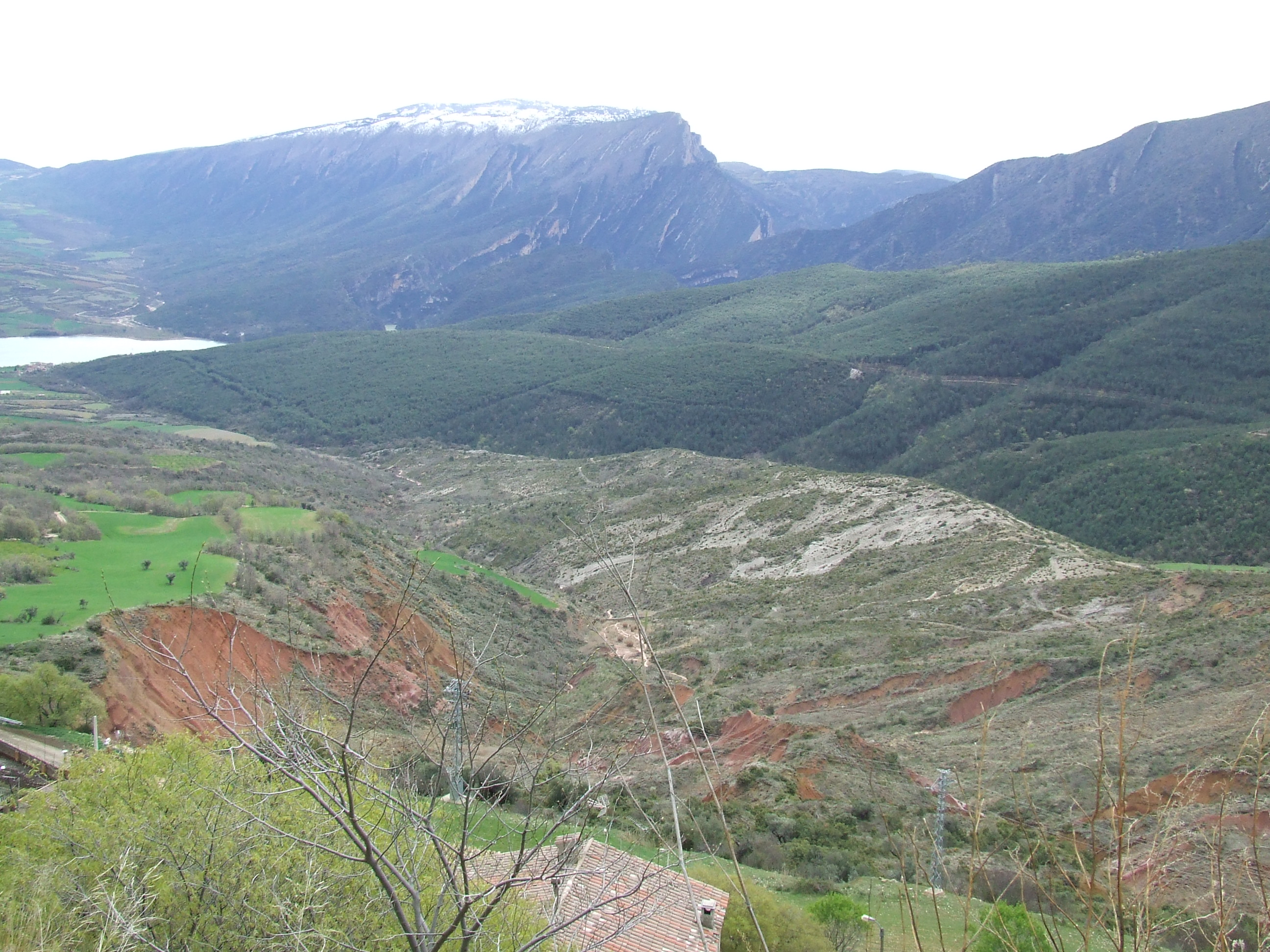 La Llau de la Grallera, a Guàrdia de Noguera (Castell de Mur, Pallars Jussà)